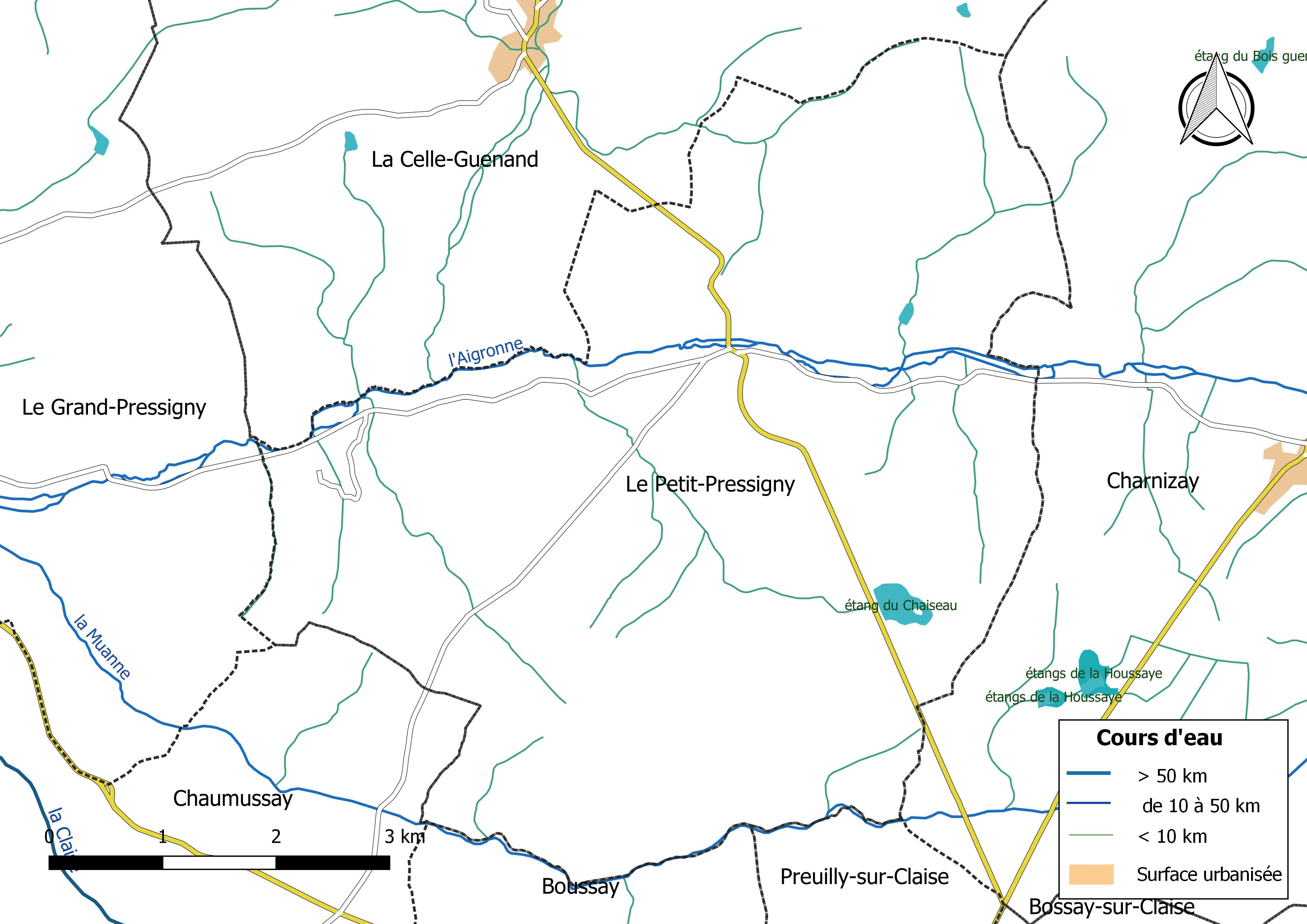 Carte du réseau hydrographique de la commune de Le Petit-Pressigny (France).